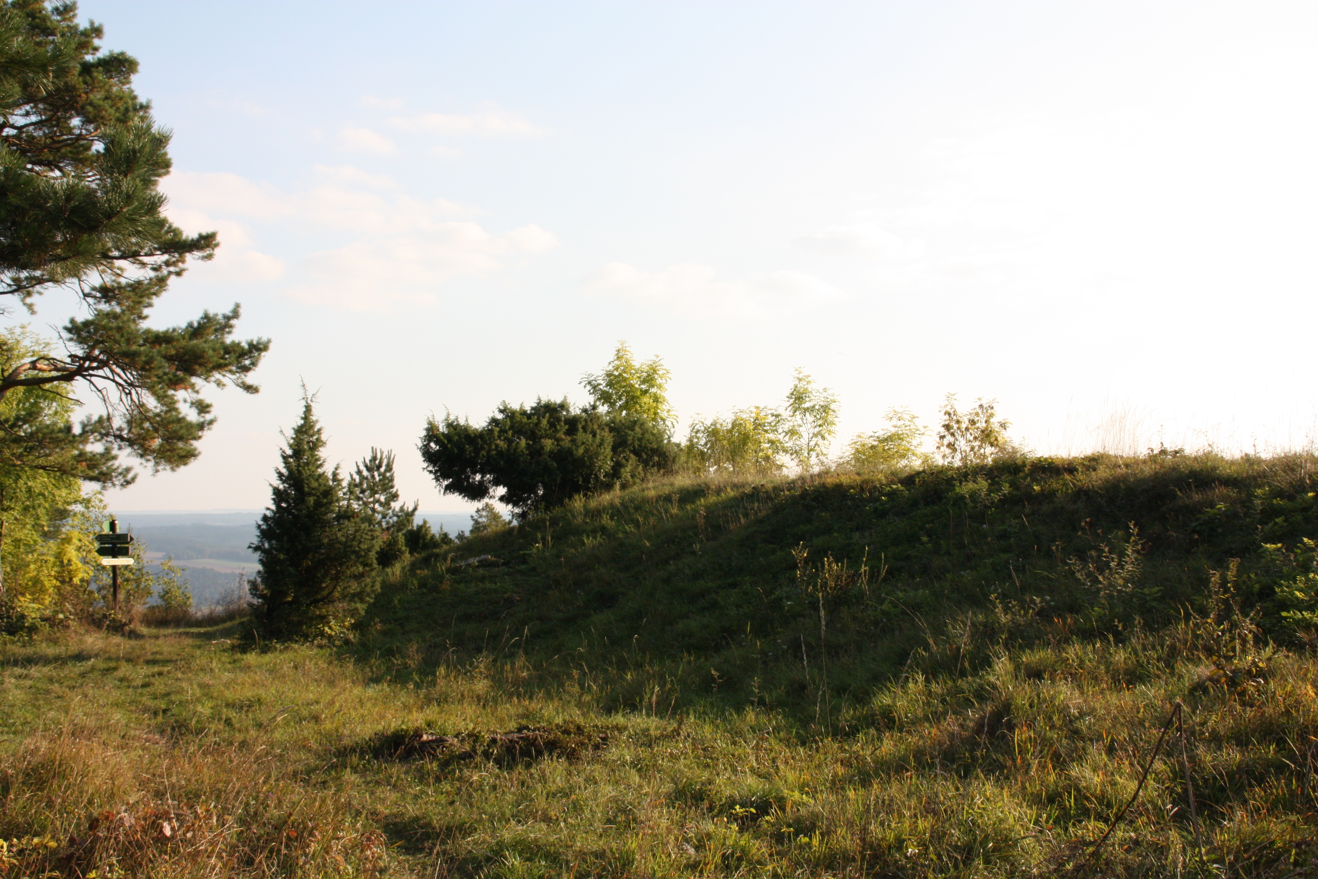 Jena-Lobeda, Johannisberg. Blick von Nordosten auf den äußeren Wall mit den Resten der frühmittelalterlichen Befestigung.